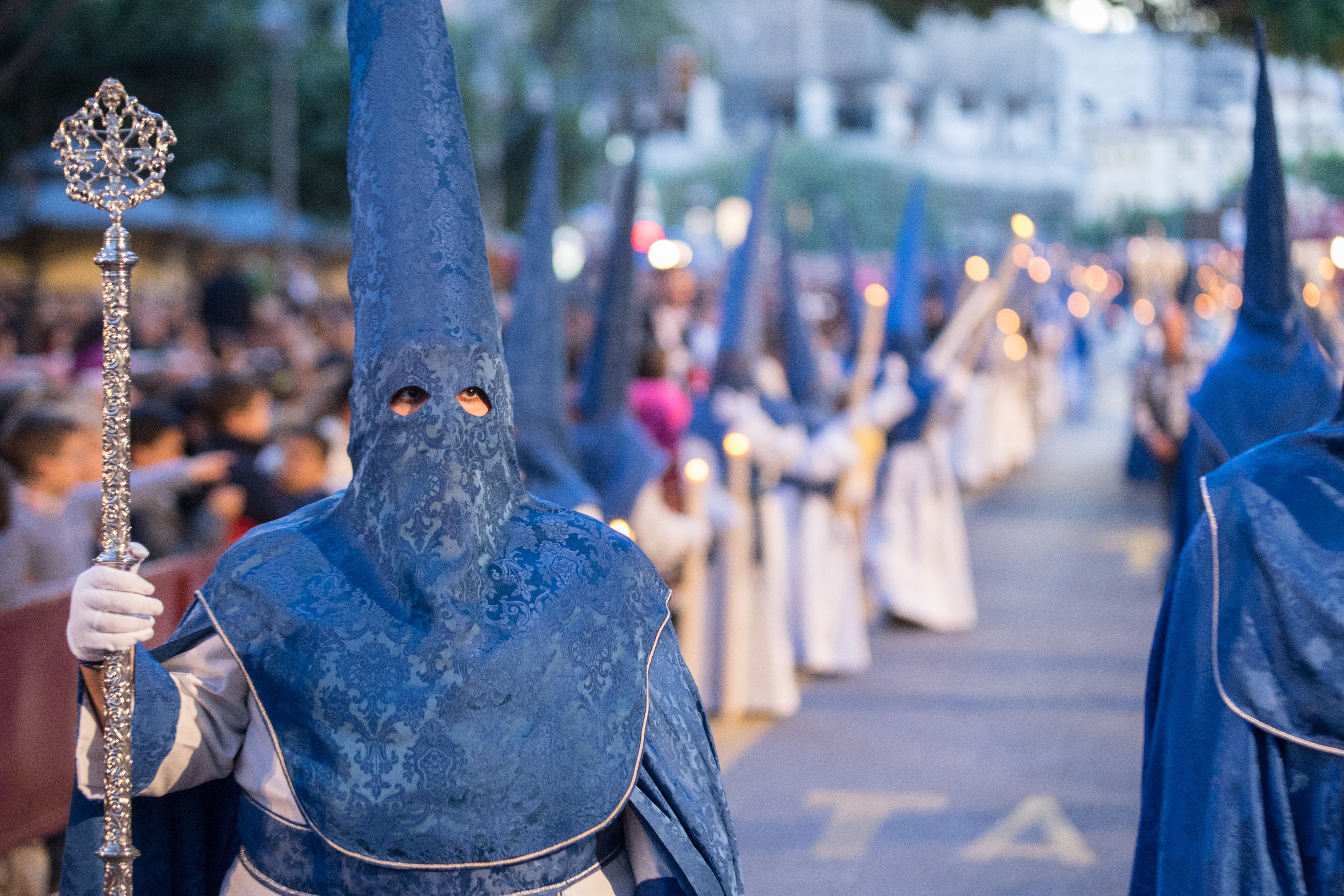 Nazareno del trono de la Conpcepción de la Pontificia, Muy Ilustre y Venerable Archicofradía Sacramental y Seráfica de Nuestro Padre Jesús Orando en el Huerto, Nuestra Señora de la Concepción, San Juan Evangelista y Nuestra Señora de la Oliva This is a photography of a Folklore festival in Spain (Wikidata id Q9075883).